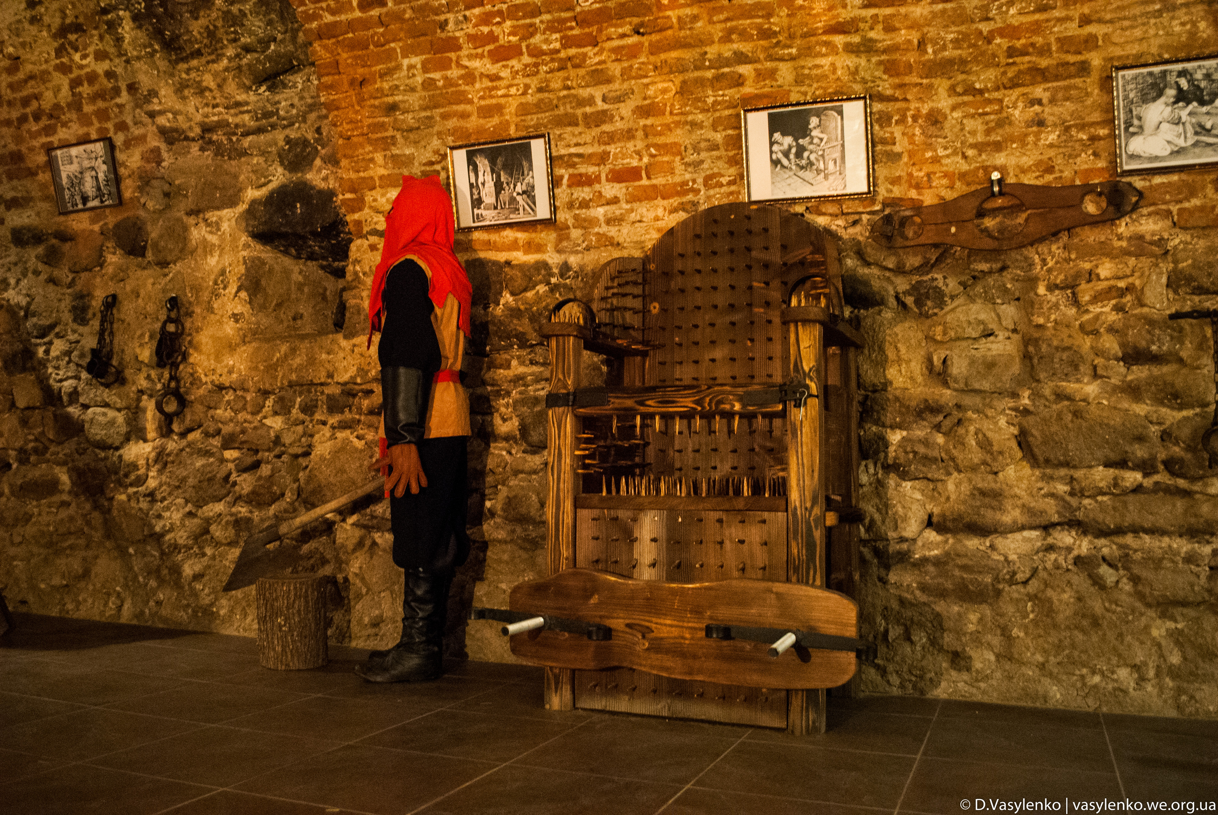 Uzhgorod